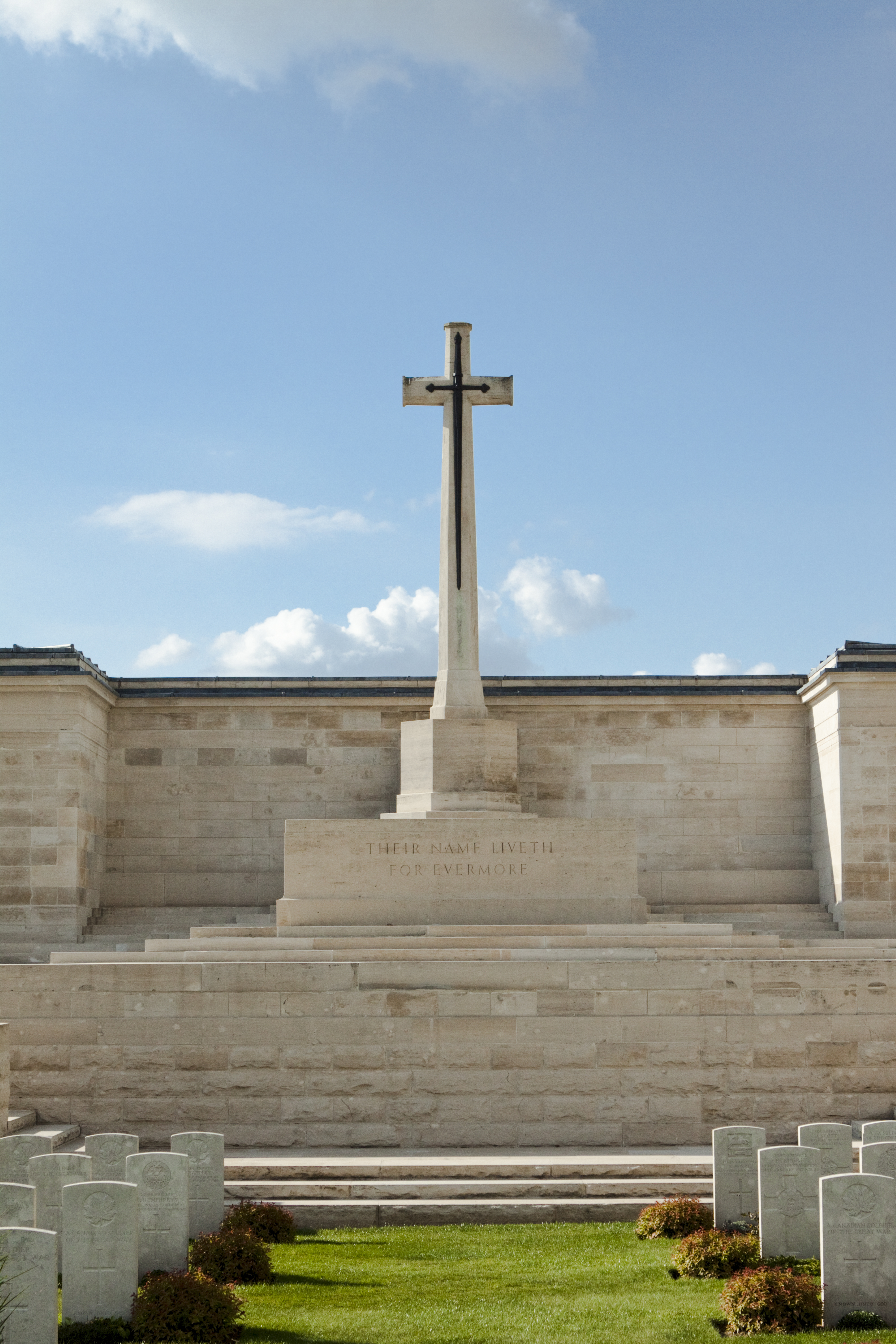 Pozieres British Cemetery